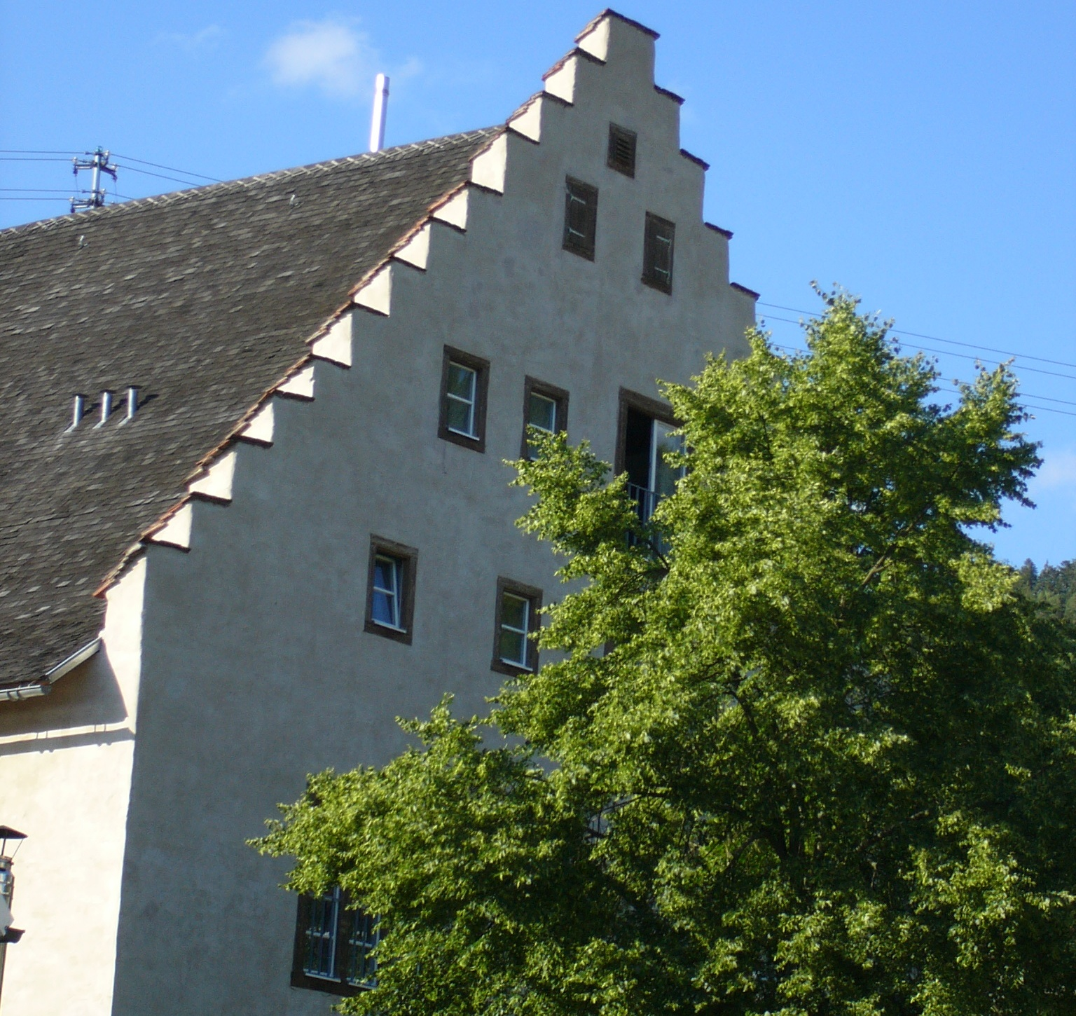 Hohbiel mit Staffelgiebel Wurmlingen bei Tuttlingen